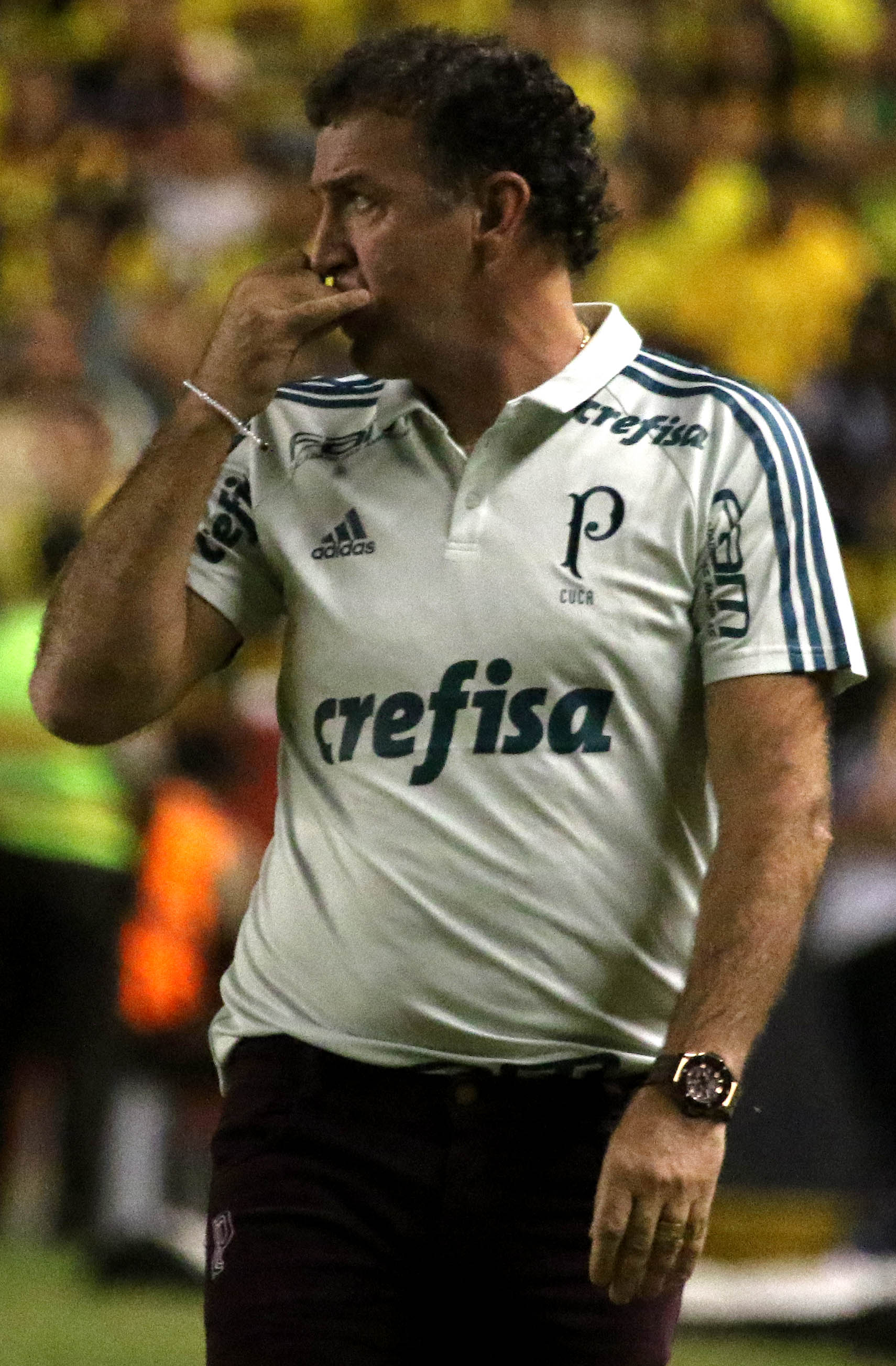 Guayaquil, miércoles 05 de julio del 2017 (Andes).-En el estadio Monumental, Barcelona enfrenta a Palmeiras por los octavos de final de la Copa Libertadores. En la gráfica Alexi Stival "Cuca" DT. del Palmeiras Foto:Andes/César Muñoz